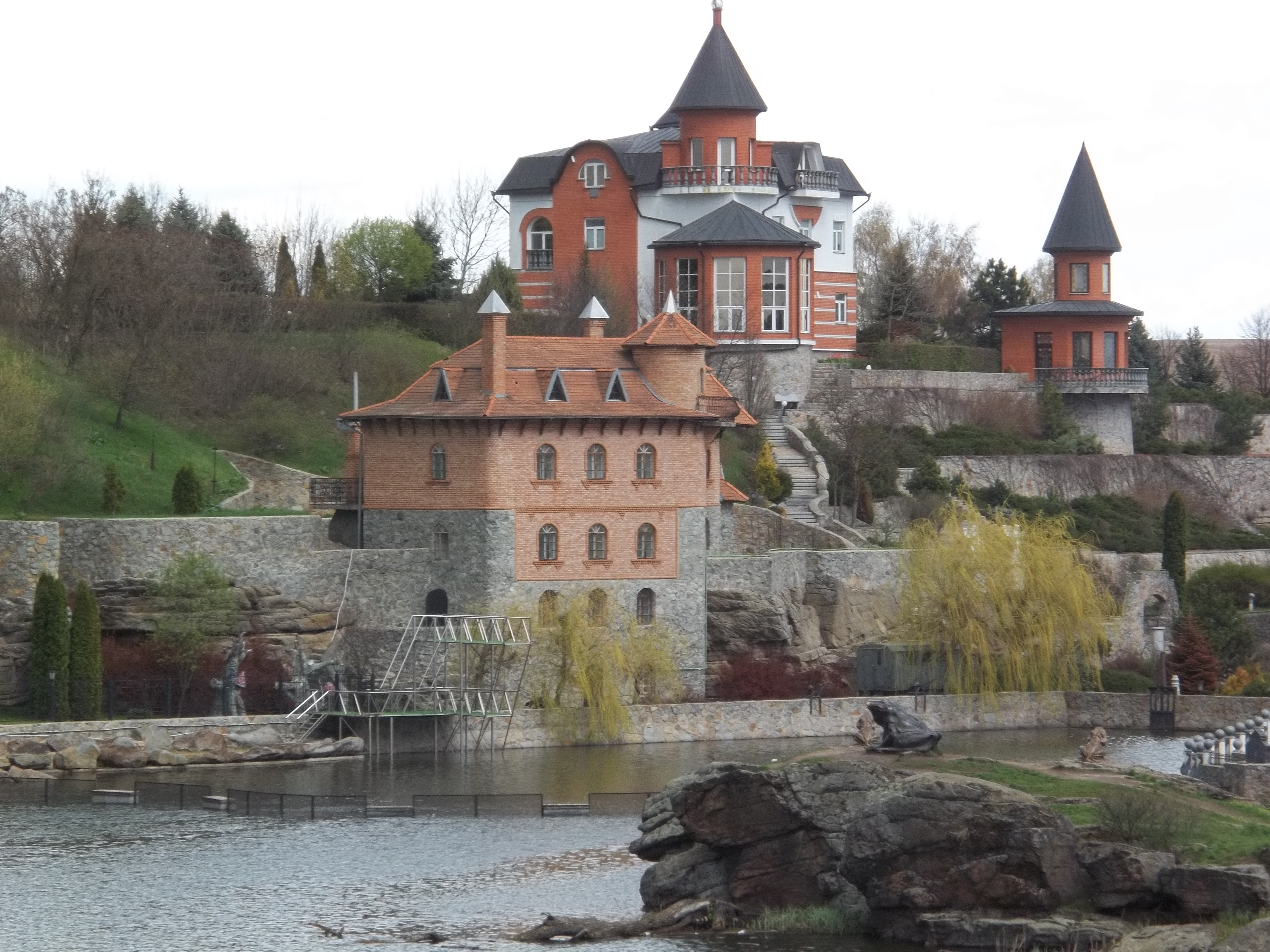 Ландшафтный парк в селе Буки, Украина